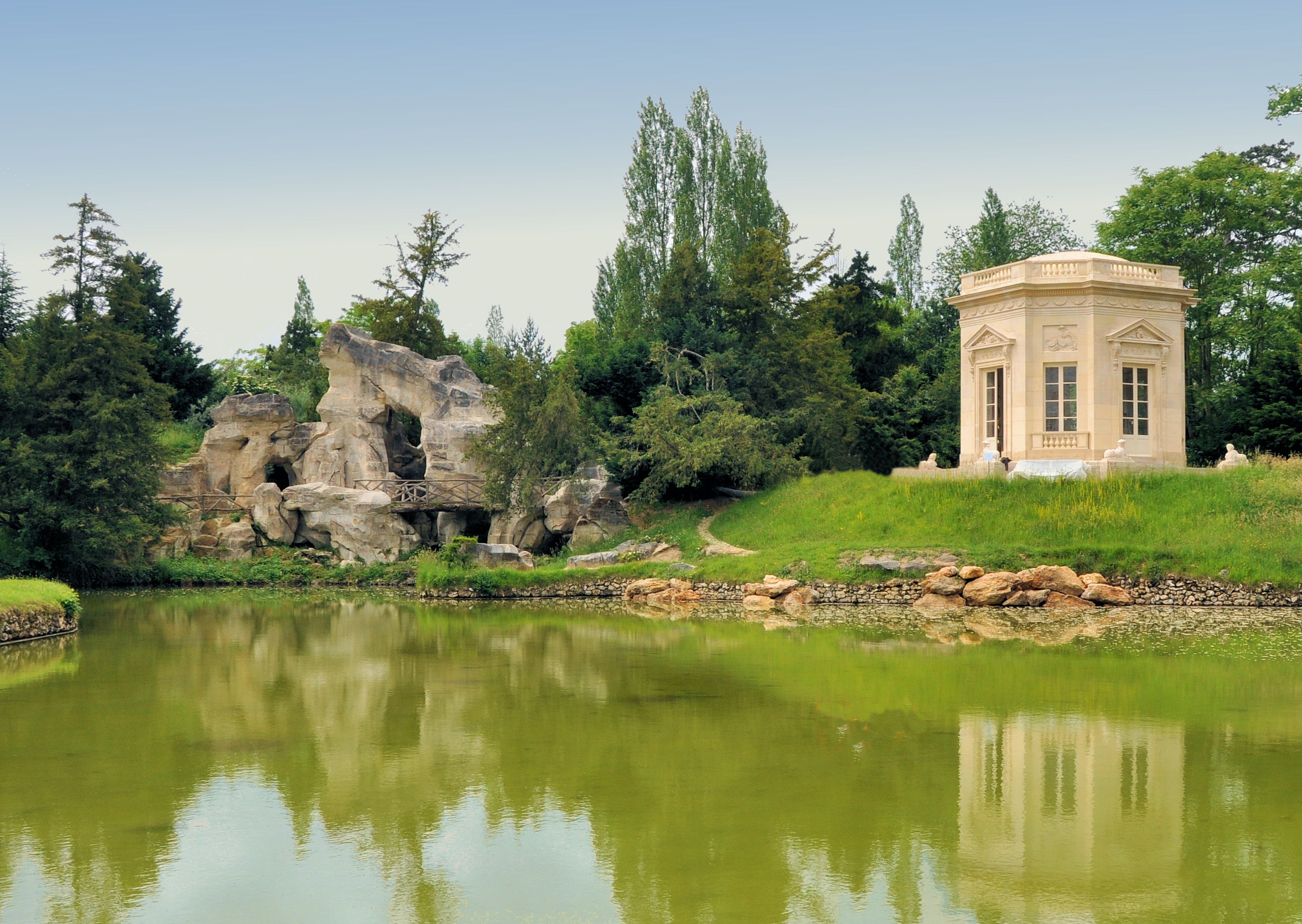 Petit Trianon - Belvédère et Grand rocher